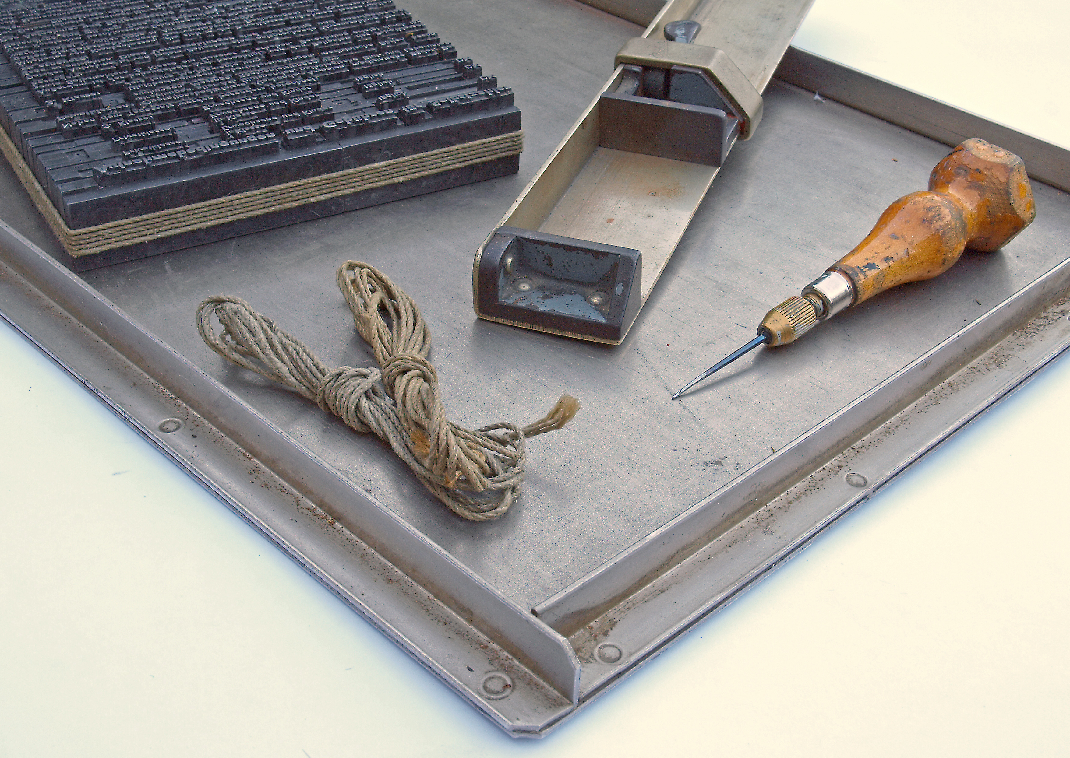 Ahle, Kolumnenschnur, Winkelhaken und ausgebundene Kolumne auf einem Setzschiff